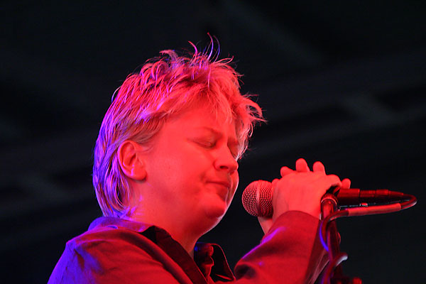 Anne Clark. Konzertfoto vom Mera Luna 2004.